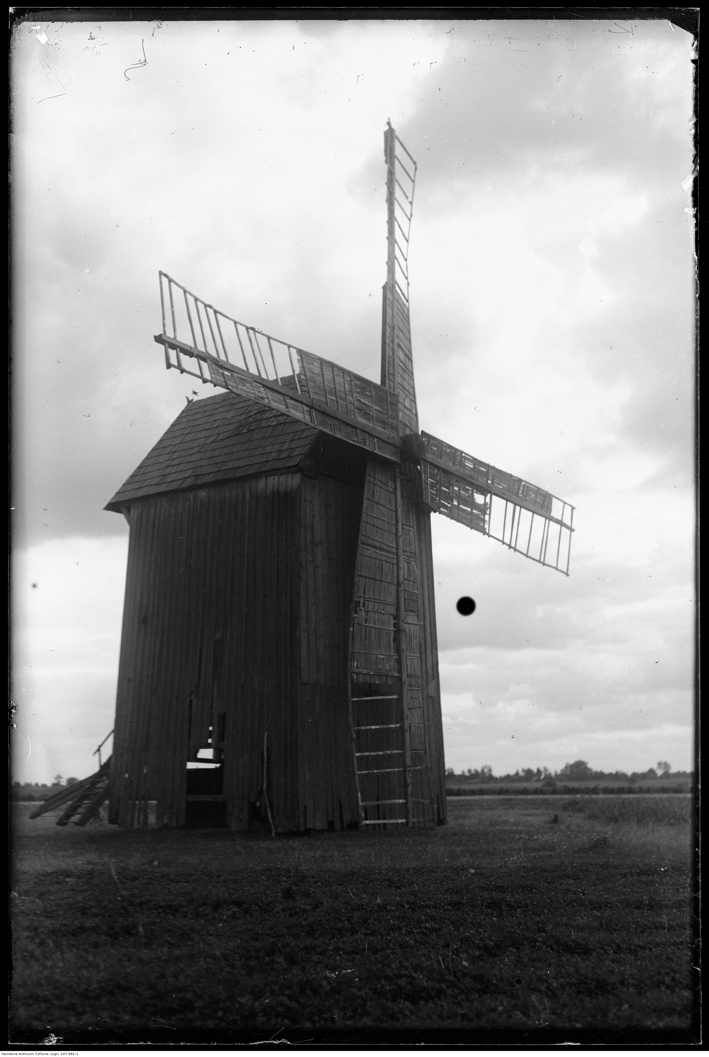 Wiatrak.